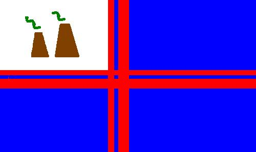 Bandeira aproximada do Município de Nova Aliança - SP